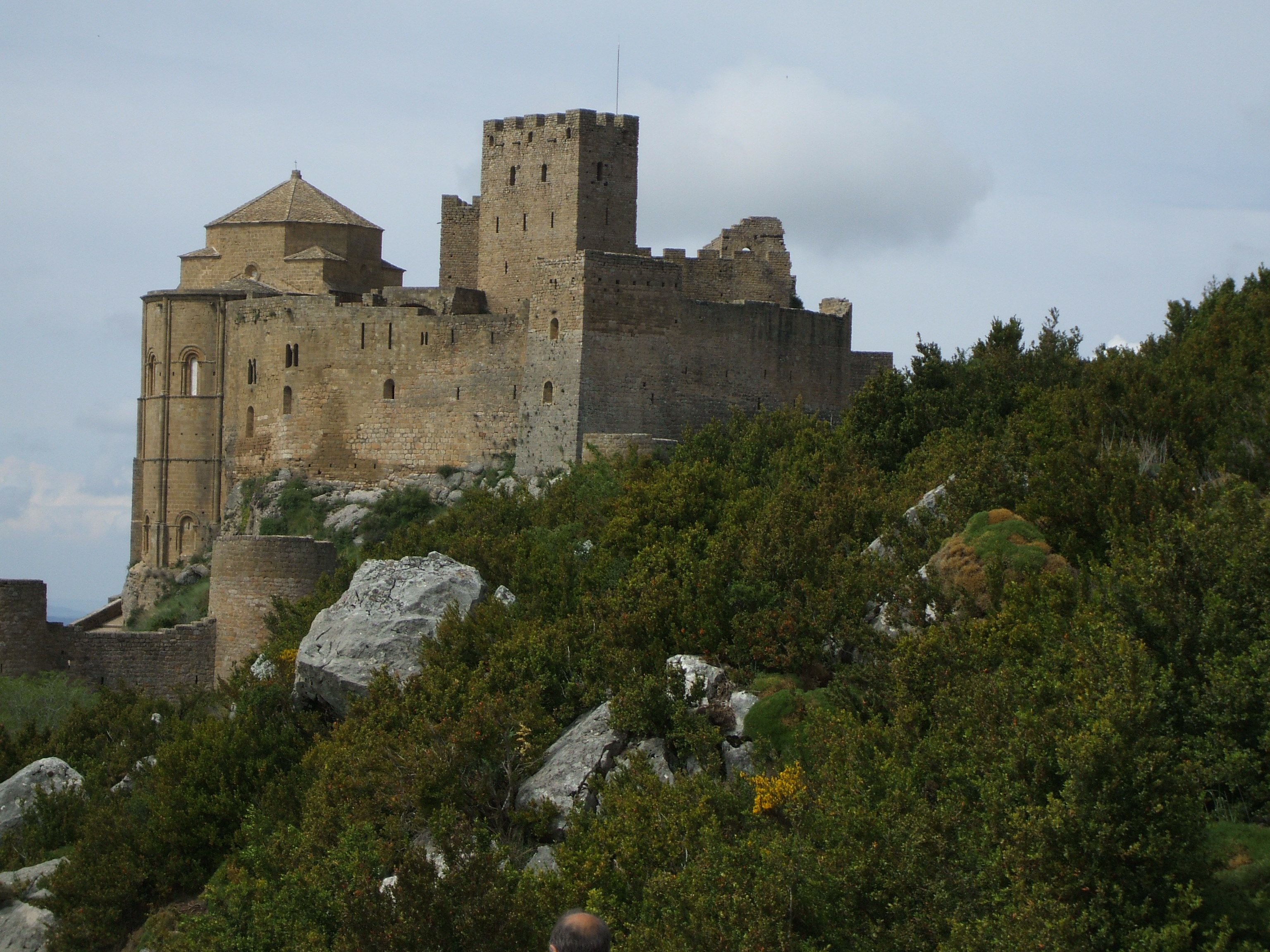 Foto sacada del castillo de Loarre